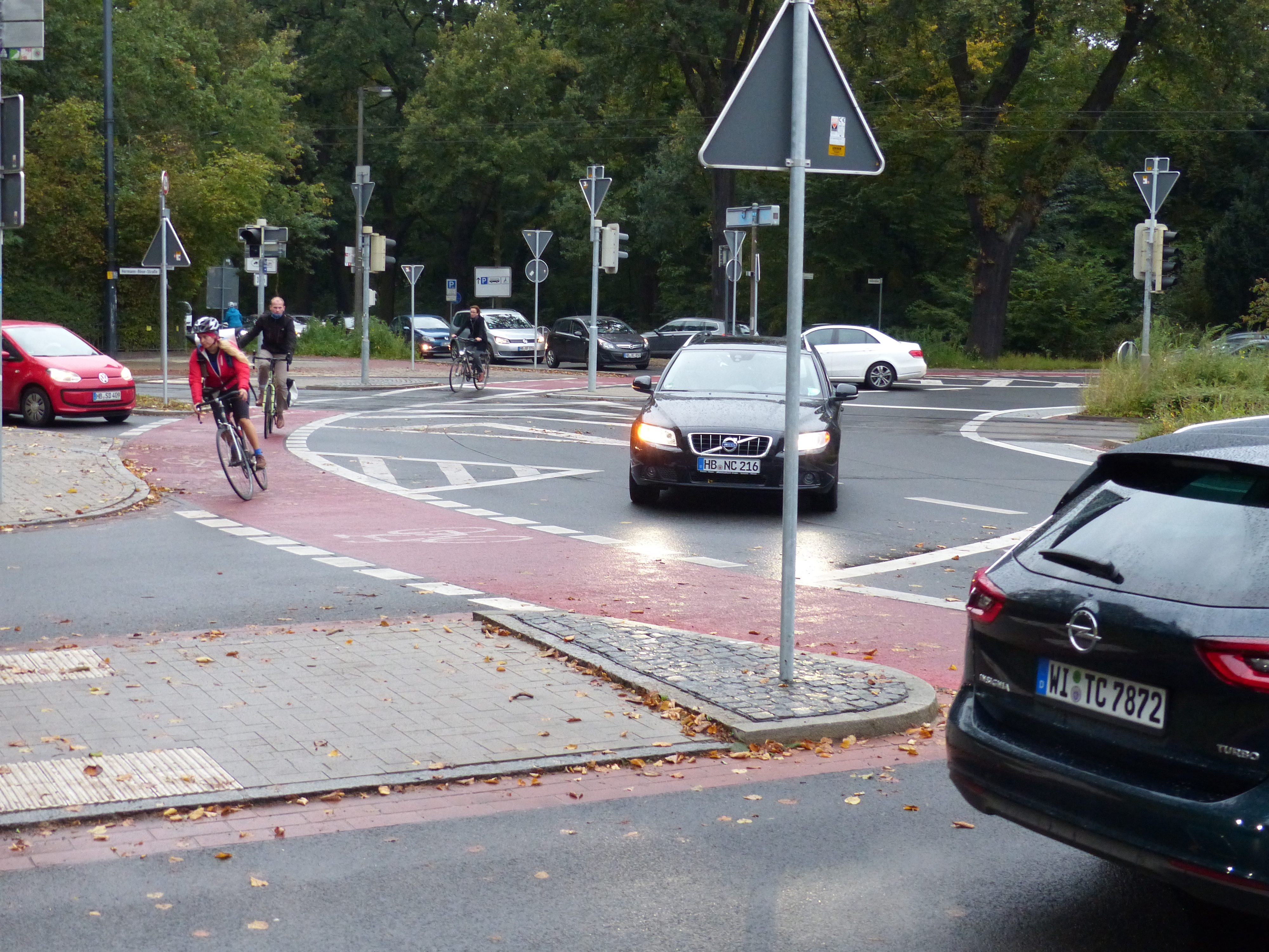 De-Facto-Kreisverkehr Am Stern in Bremen seit dem Umbau im Sommer 2017: Zwei Radler und ein PKW biegen in die (innere) Parkallee ab, eine Fahrradstraße mit zwei Richtungsfahrbahnen, vormals Hauptstraße, jetzt Premiumroute.